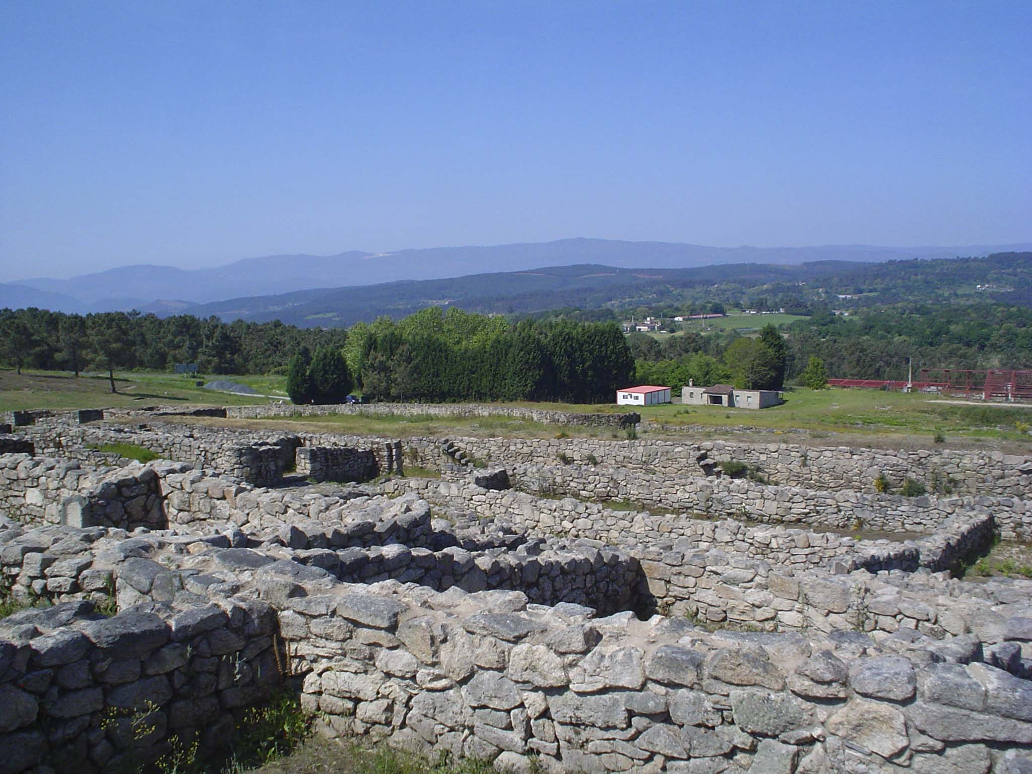 Construcións__na_zona_oeste_da_antecroa_do_Castro_de_Las